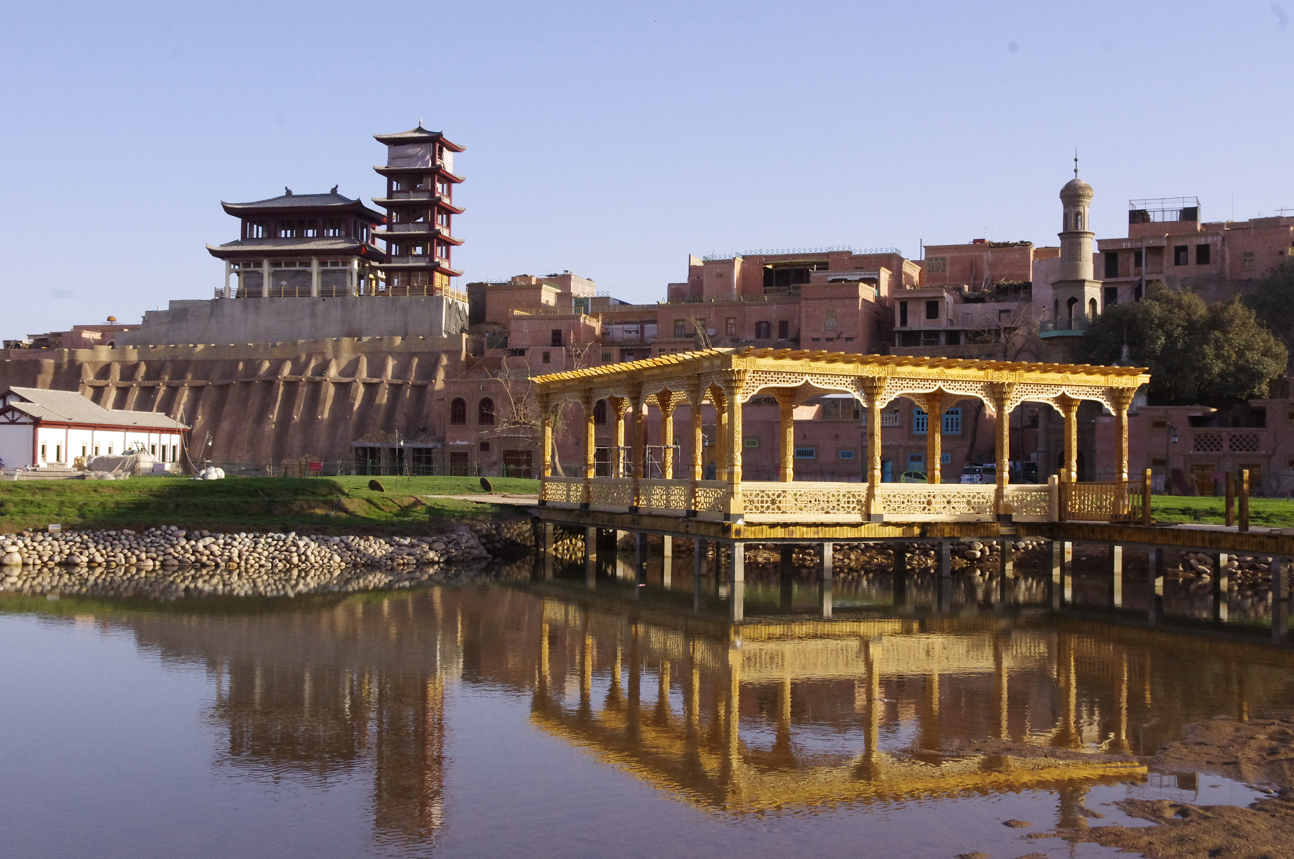 The making of this document was supported by Wikimedia Polska. To zdjęcie zostało wykonane podczas Wikiwyprawy 2015.Wszystkie zdjęcia z wyprawy możesz zobaczyć w kategorii: Wikiwyprawa 2015. English | polski | +/− To zdjęcie zostało załadowane dzięki współpracy z firmą Hyperbook. polski | +/− To zdjęcie zostało załadowane dzięki współpracy z firmą: Kopex Group. English | polski | +/−